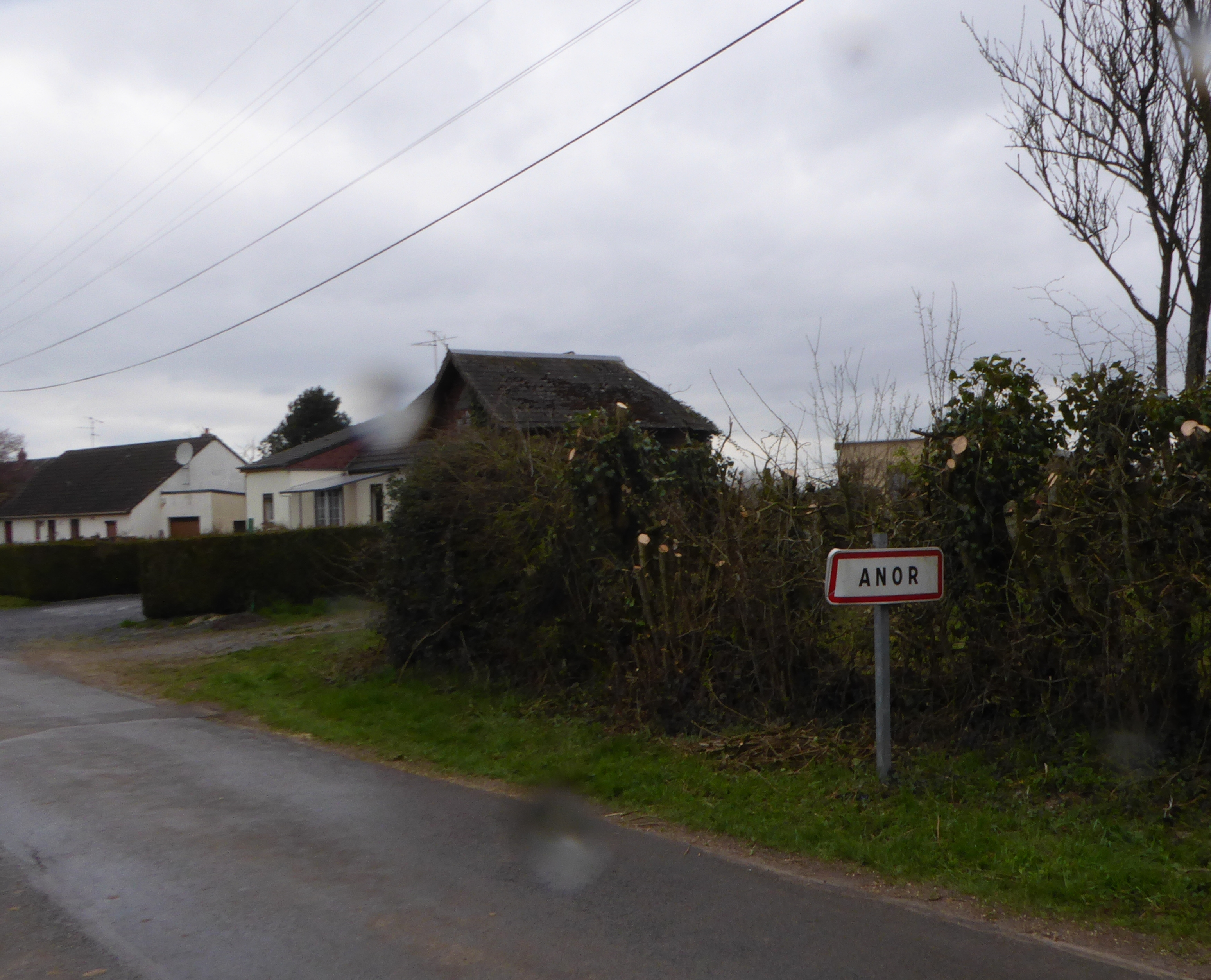 City limit Anor, Nord, France.